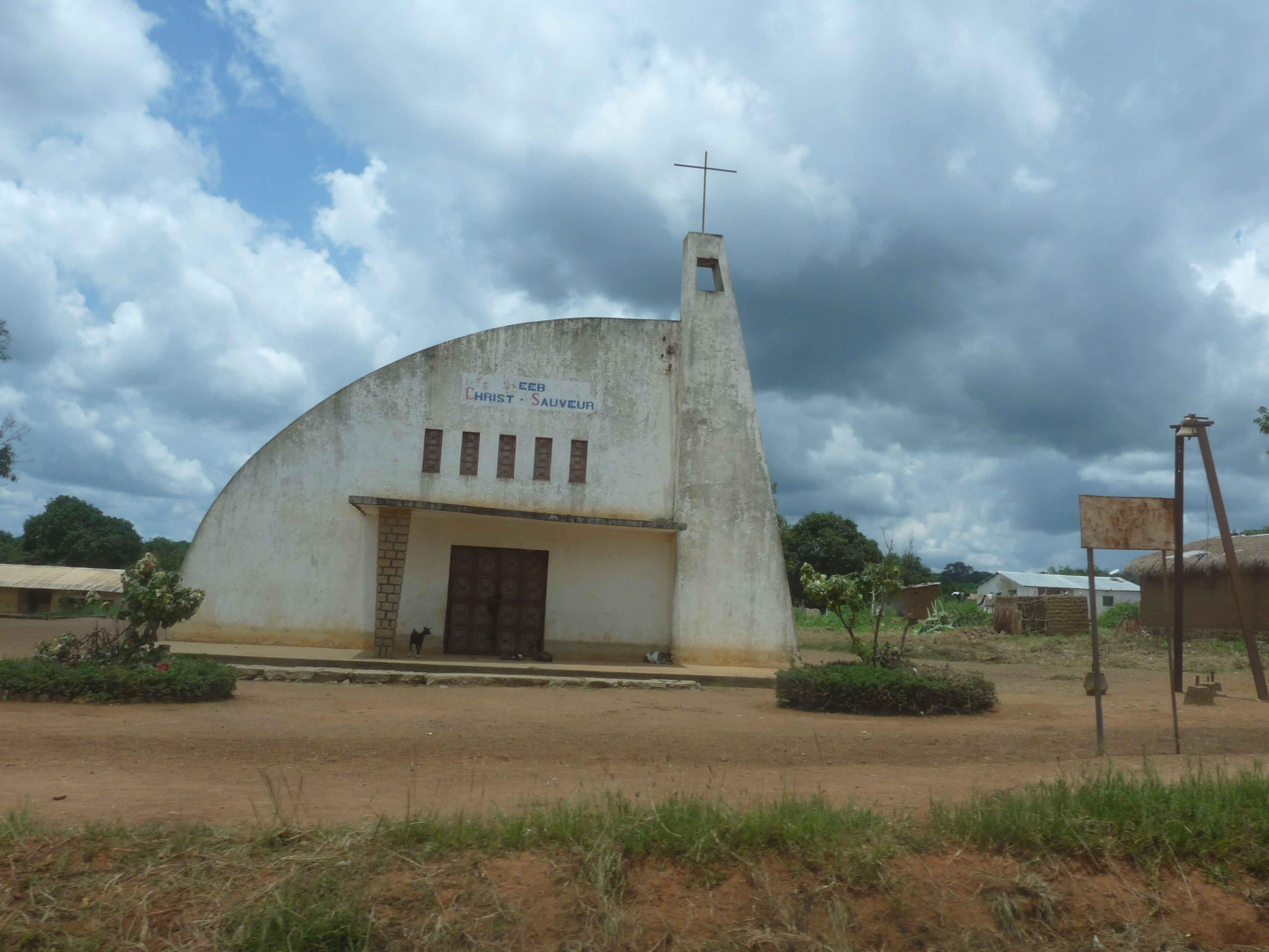 Église évangélique baptiste christ sauveur Bouar, Centrafrique.